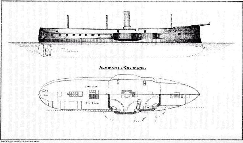 Elevacion y perfil de la fragata blindada Cochrane